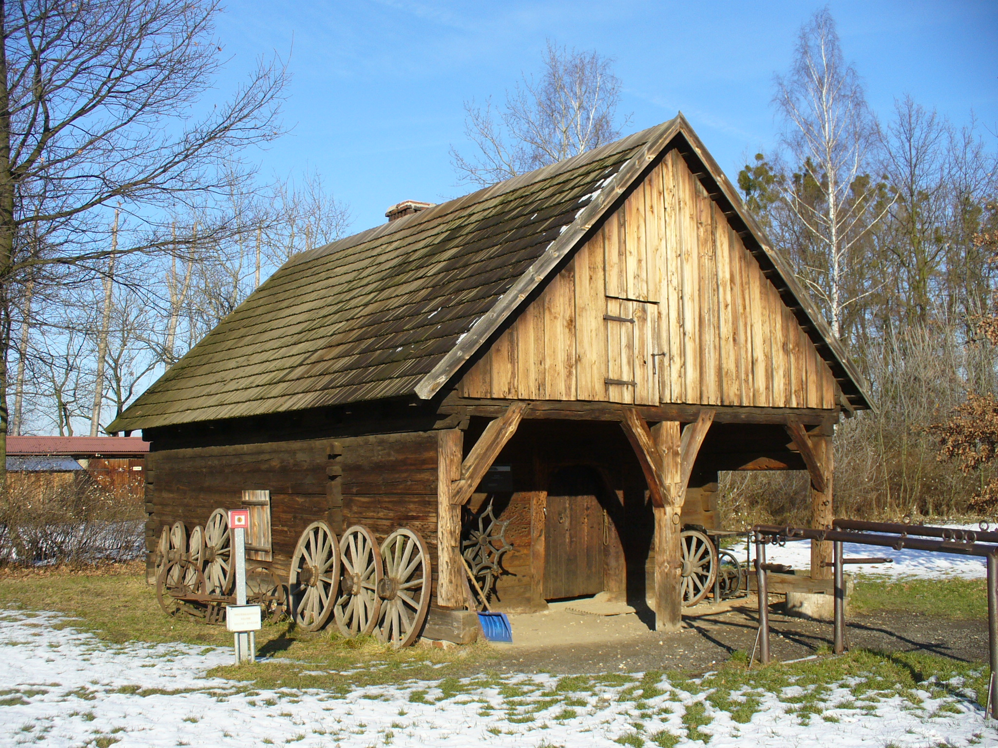 Muzeum Wsi Opolskiej - kuźnia z Ziemiełowic z 1726. Schmiede aus Simmelwitz, 1726. The smithy from Ziemiełowice (Simmelwitz), 1726.